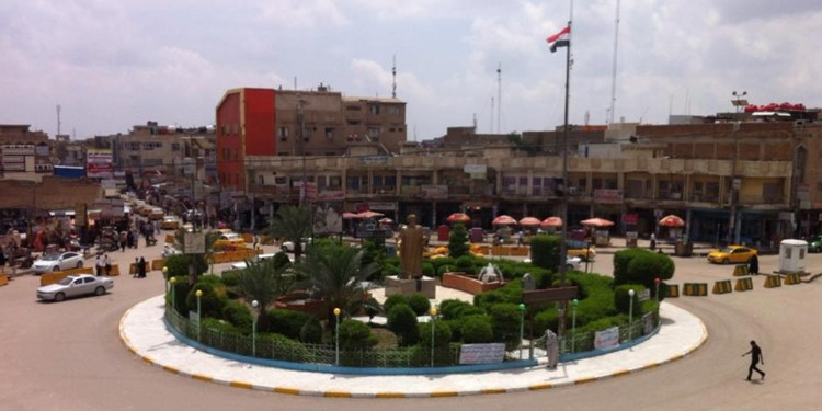 مركز محافظة ذي قار مدينة الناصرية الحبوبي